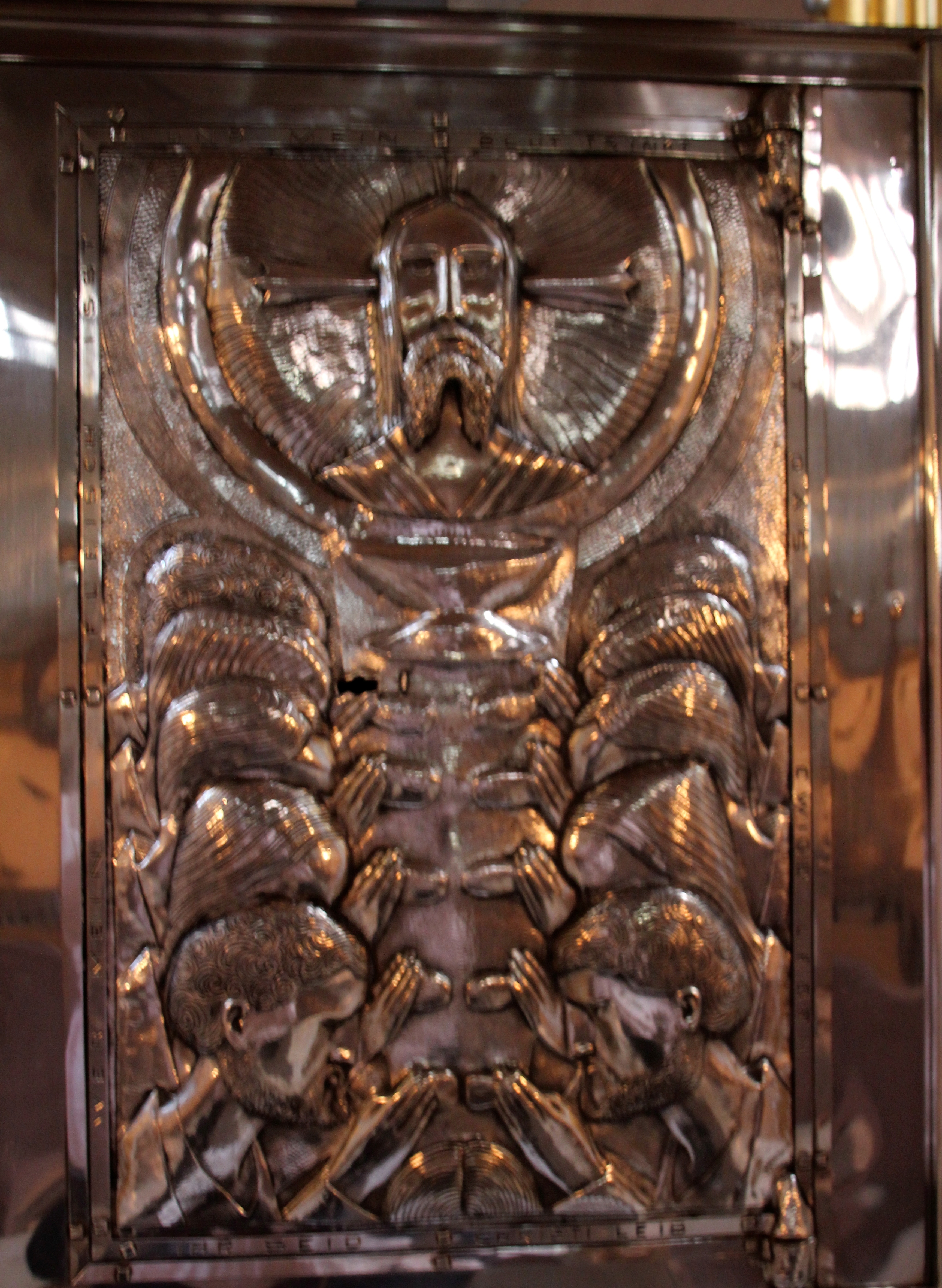 Aus Silber getriebenes Kunstwerk aus der Werkstatt Classen in Essen, Folkwangschüler